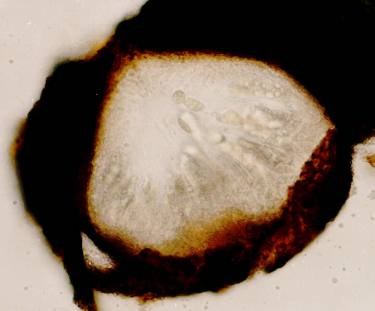 Verrucaria nigrescens